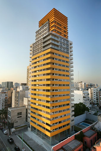 Edifico Esmeralda